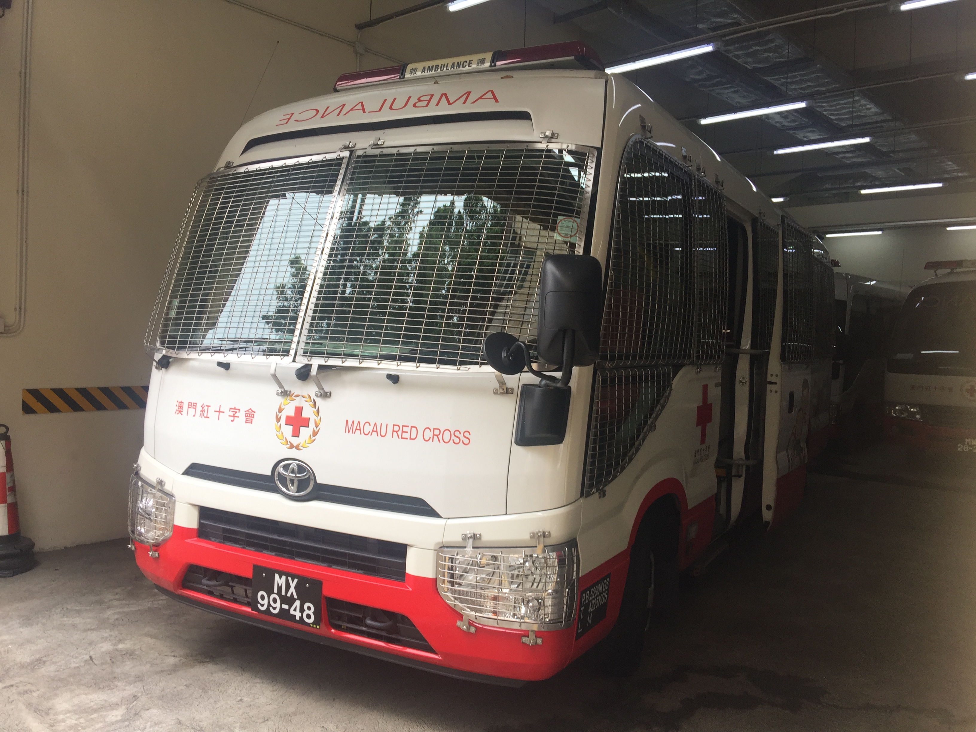 Ambulância da CVM